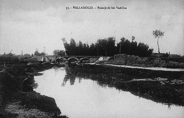 Vadillos (Los). Puente sobre el Esgueva - Valladolid - Postales Montero - Valladolid. Al fondo puede observarse el puente sobre el río Esgueva, próximo al Portillo de la Pólvora. Vadillo, se refería a la poca profundidad que tenía el brazo sur del Esgueva en ese lugar. - Tarjeta postal. Papel 140 x 90 B/N